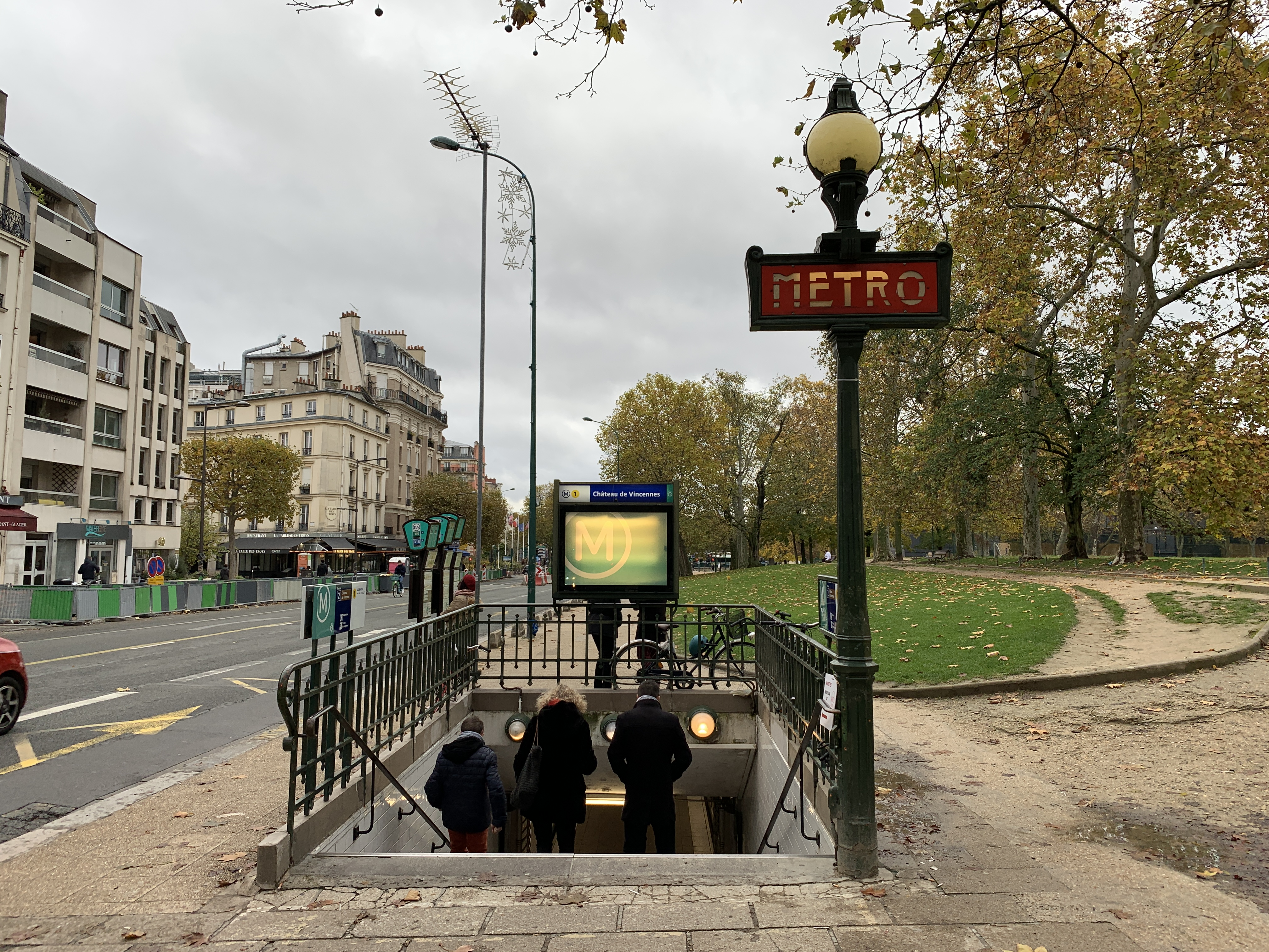 Entrée dans la station de métro Château de Vincennes, Vincennes.